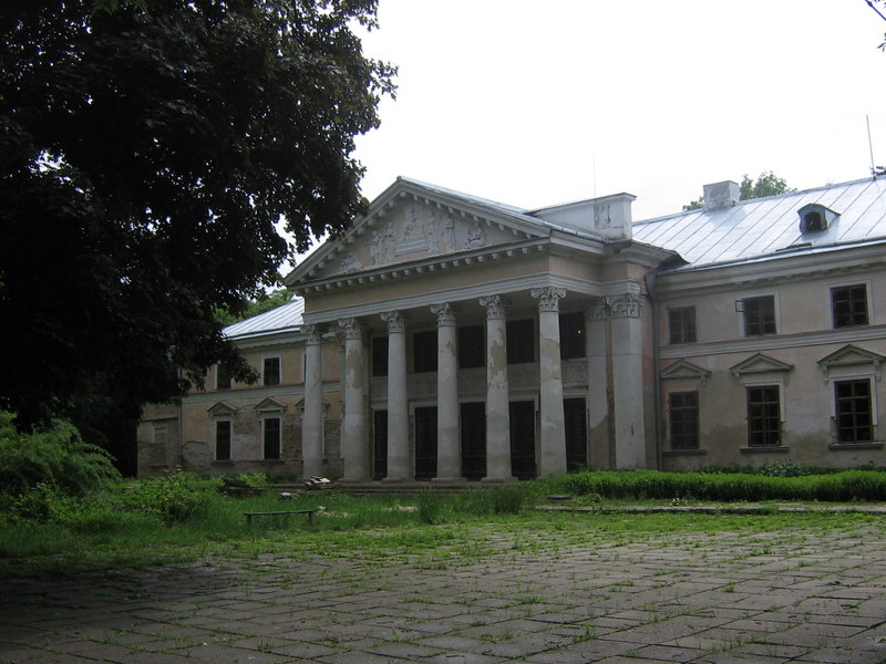 палац